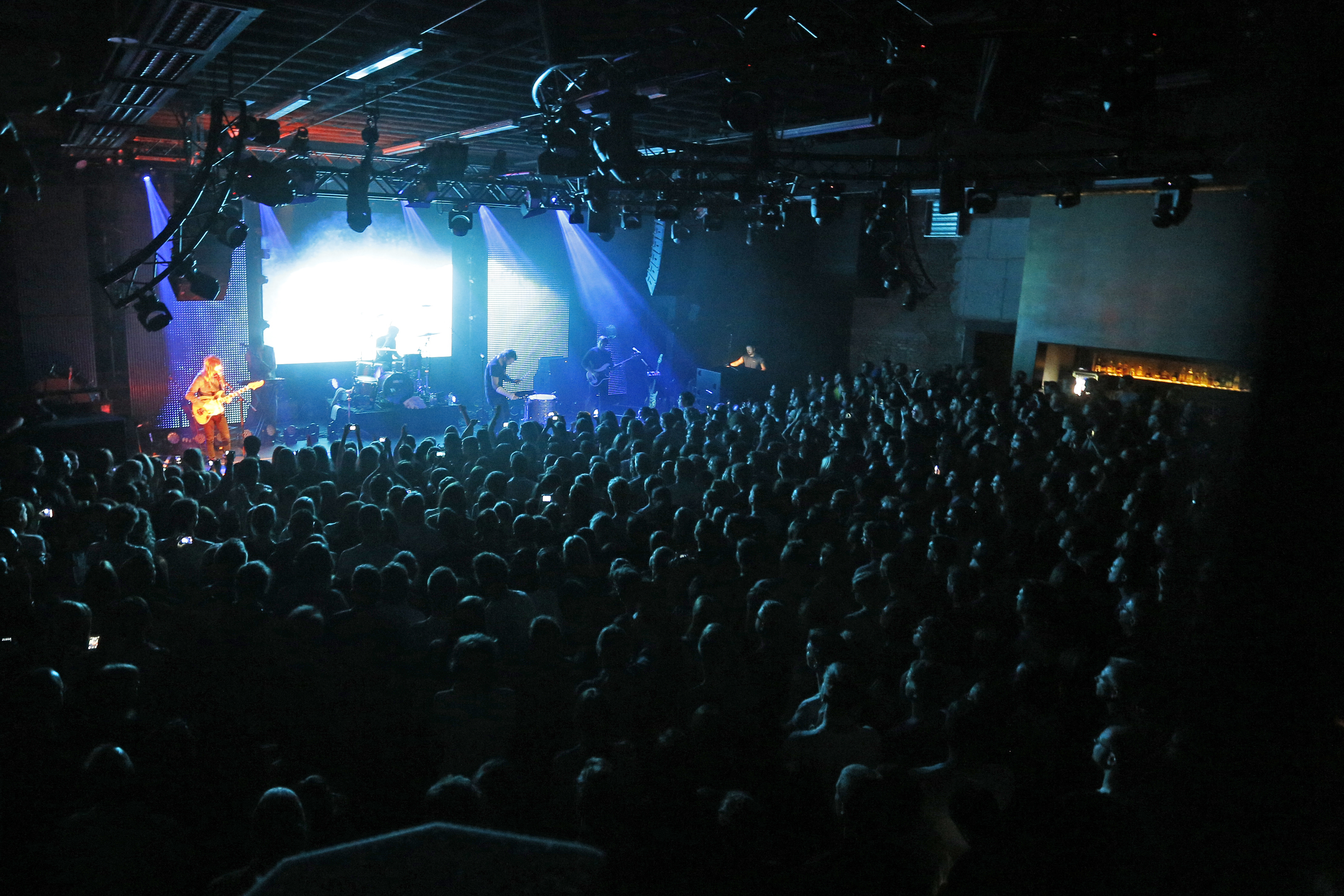 Die US-amerikanische Indie-Rock-Band Imagine Dragons spielen am 29.04.2013 im Gibson Club in Frankfurt am Main.